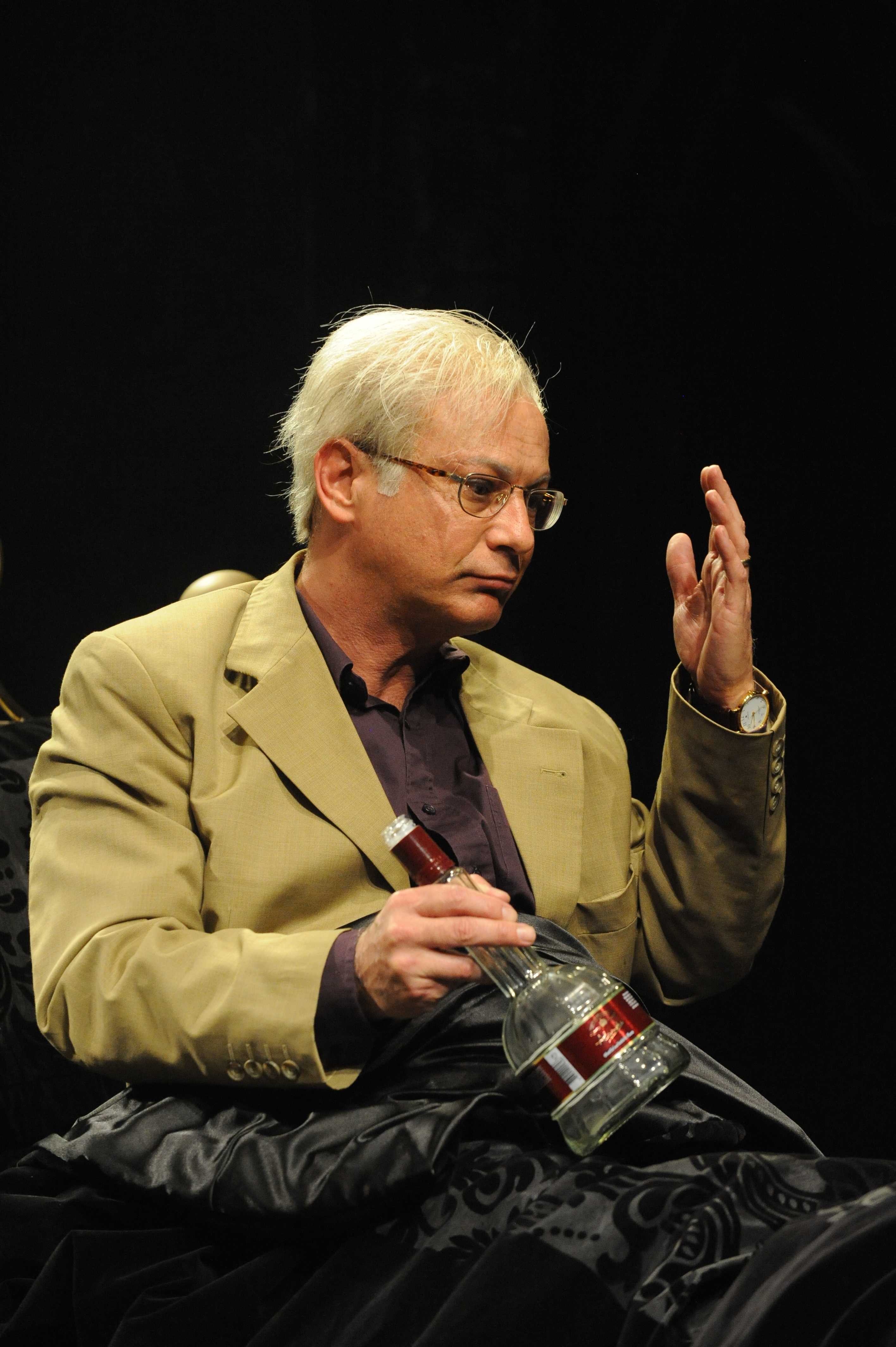 ארז שפריר בהצגה אהובת הדרקון